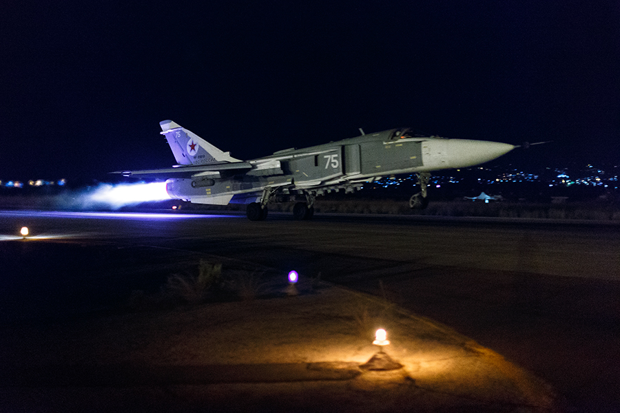 Ночные вылеты с авиабазы «Хмеймим» в Сирии